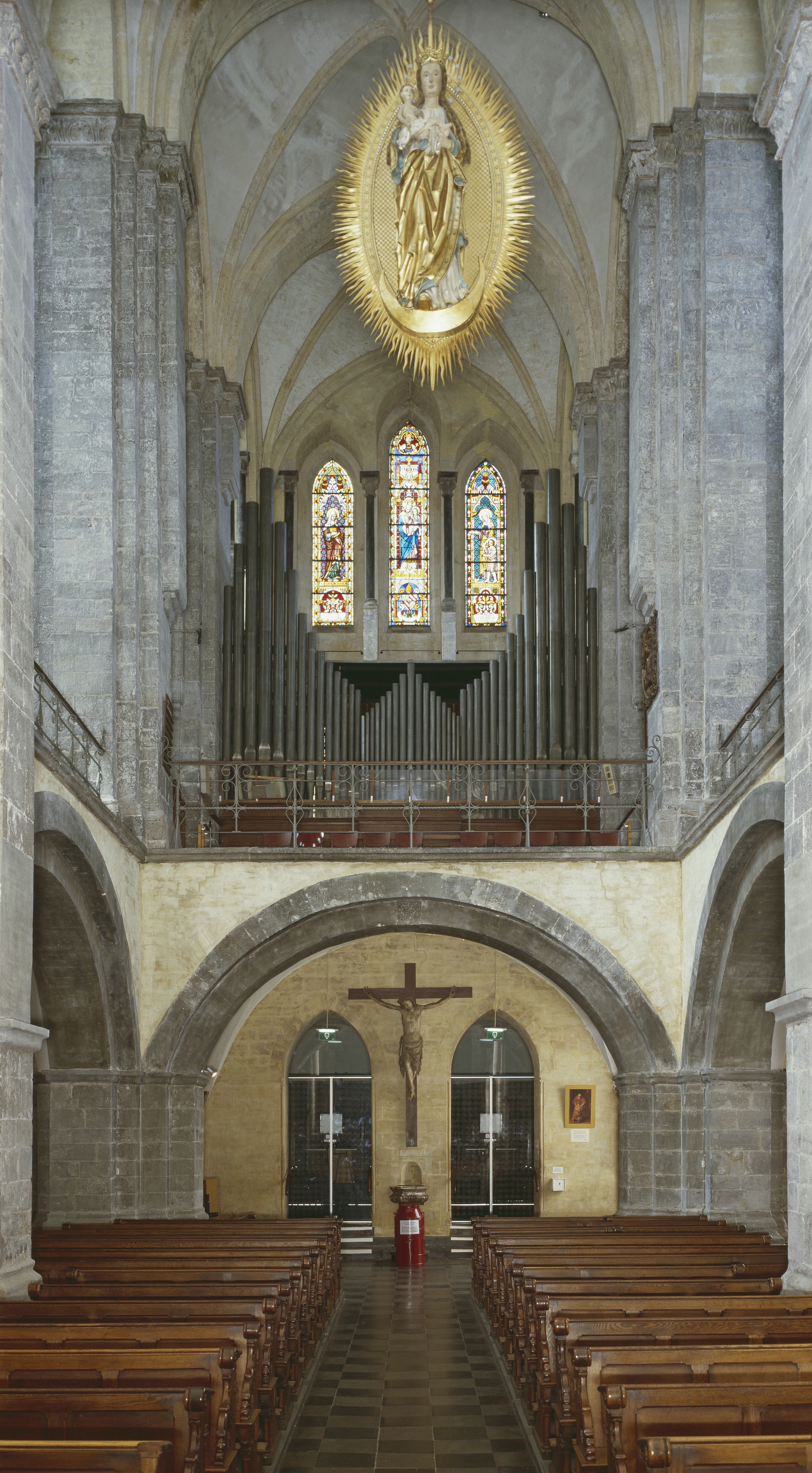 Munsterkerk Of Onze Lieve Vrouwe Kerk: Interieur, aanzicht orgel (opmerking: Gefotografeerd in het kader van de RRWR 2008 regeling)